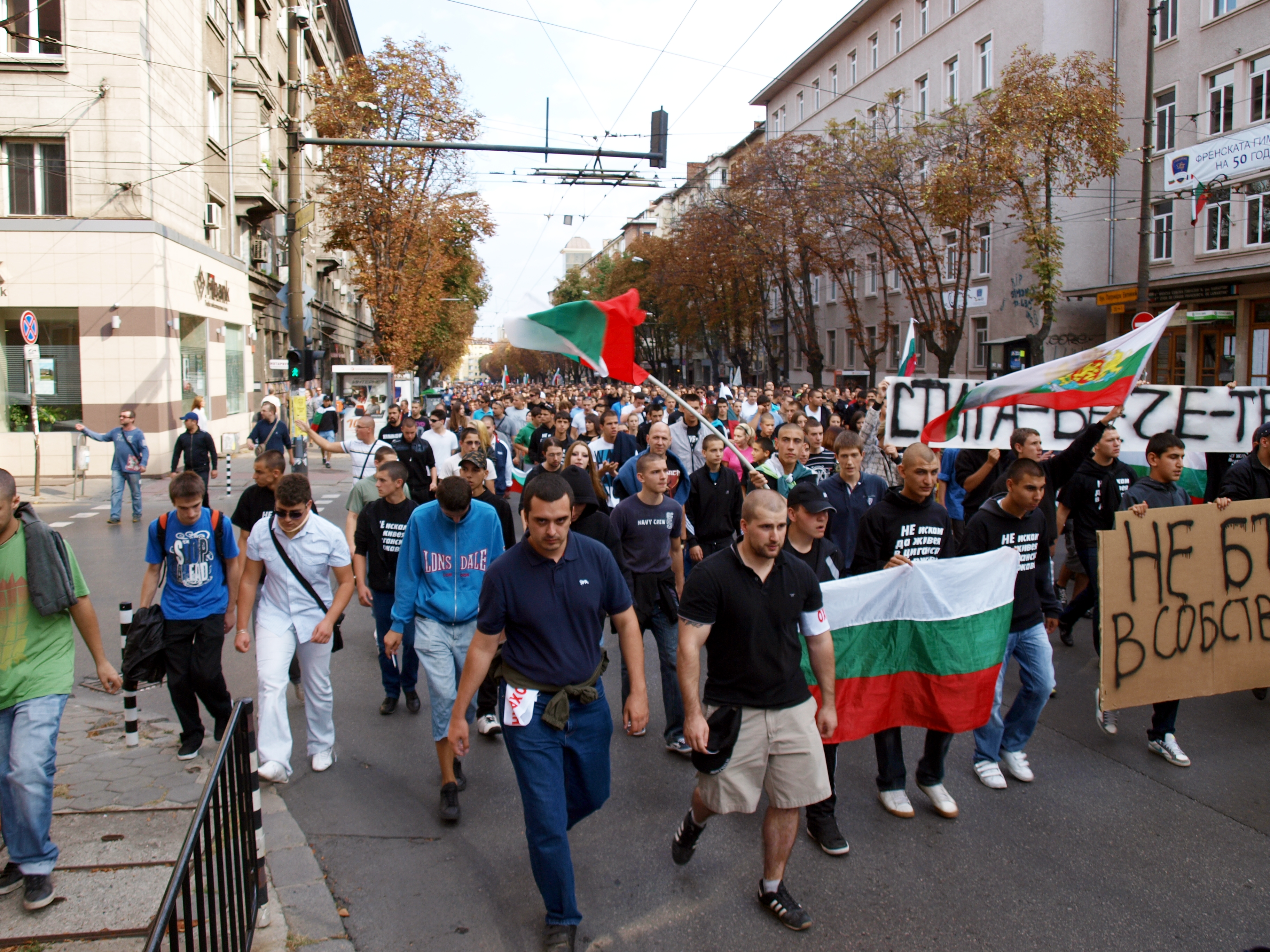 Протест срещу циганската престъпност в София.